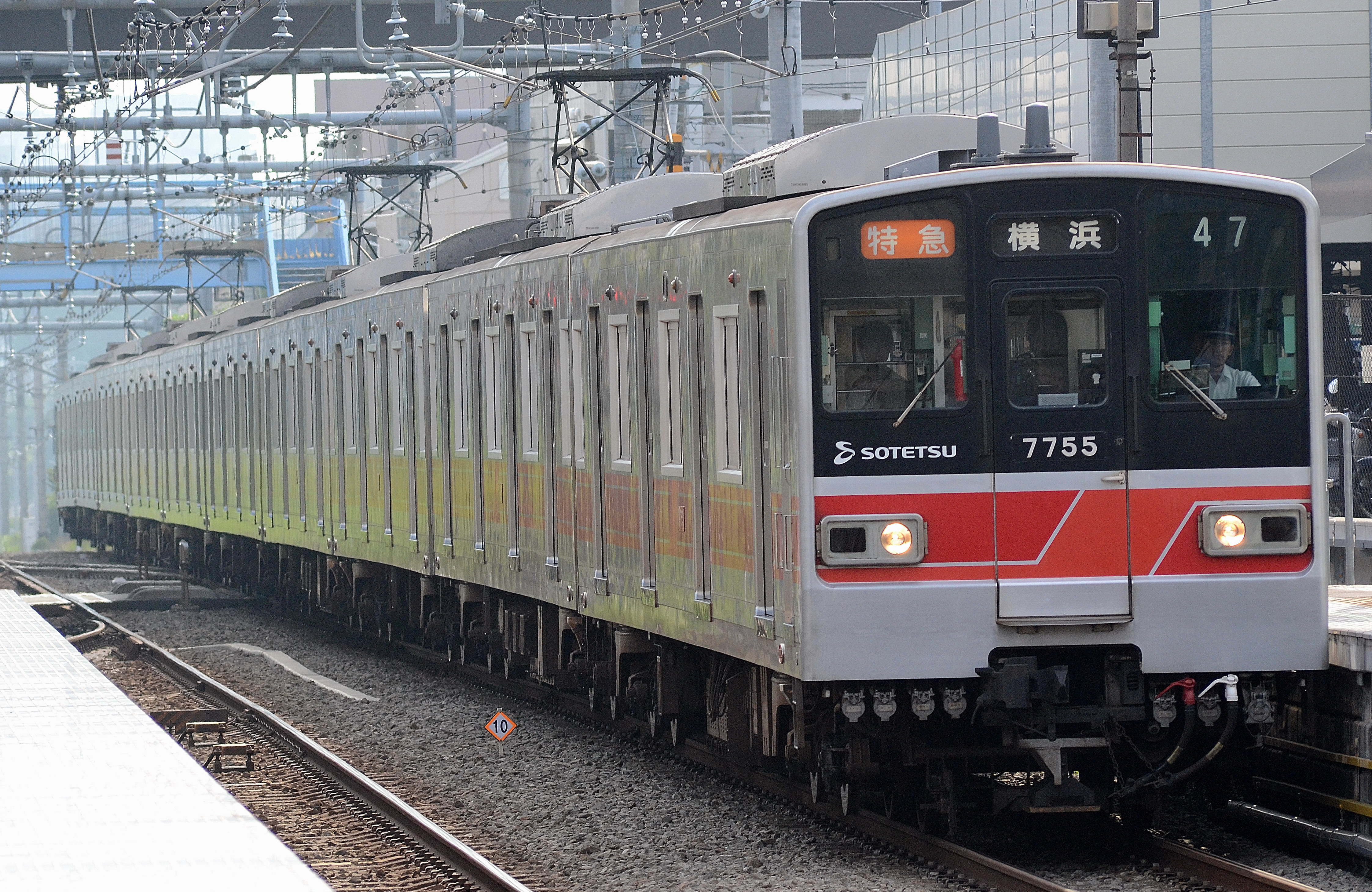 相模鉄道新7000系電車による特急列車